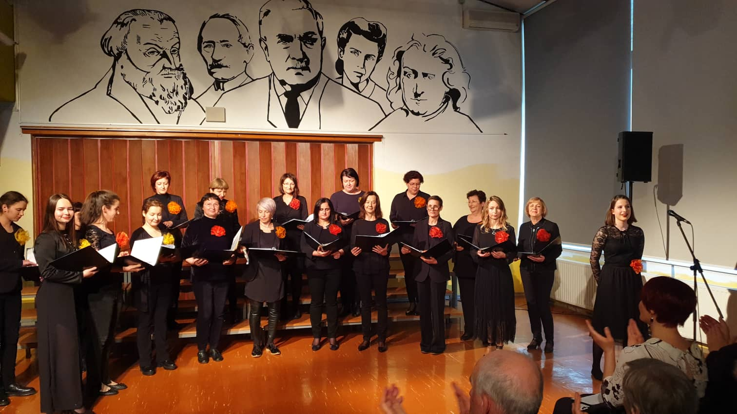 Prenovljeni zbor v 12. letu od ustanovitve